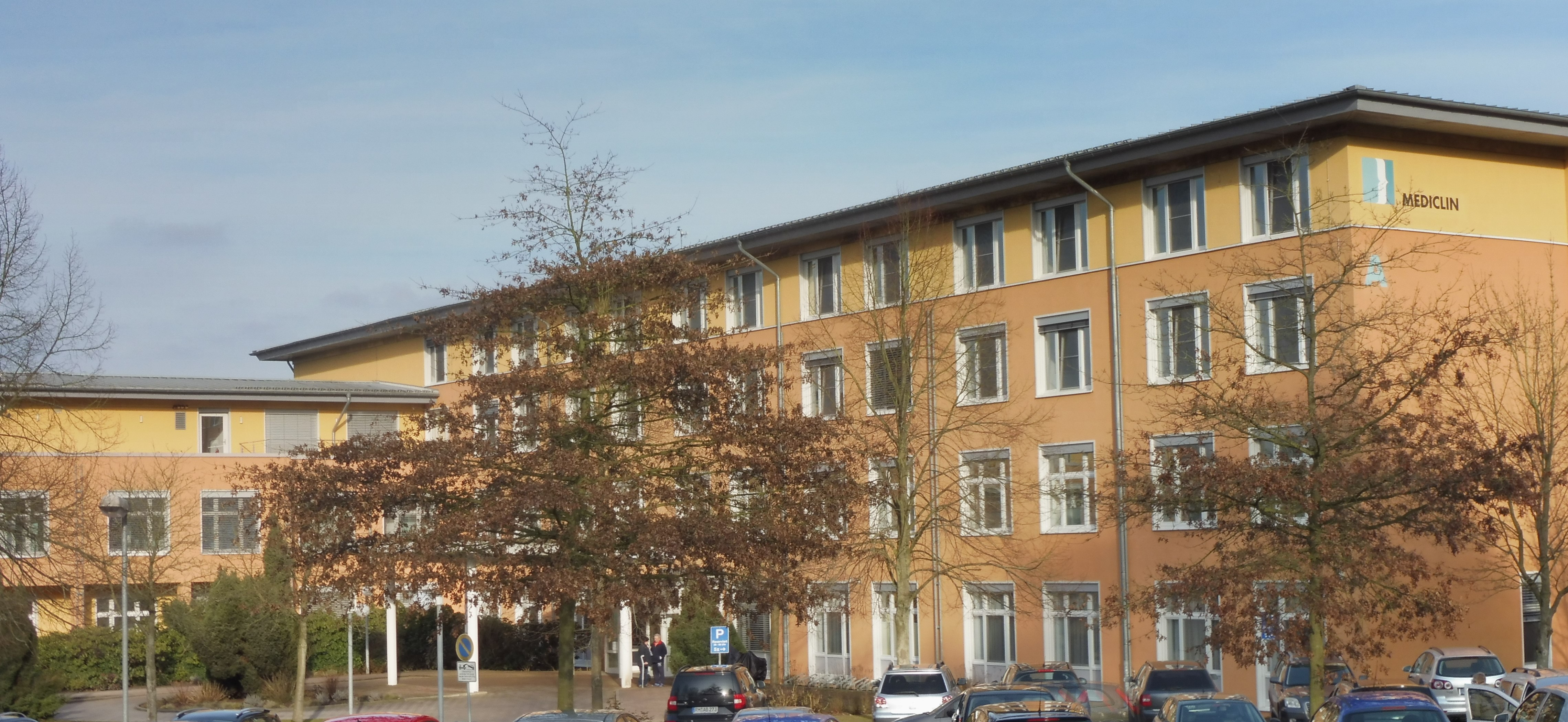 Krankenhaus Plau am See